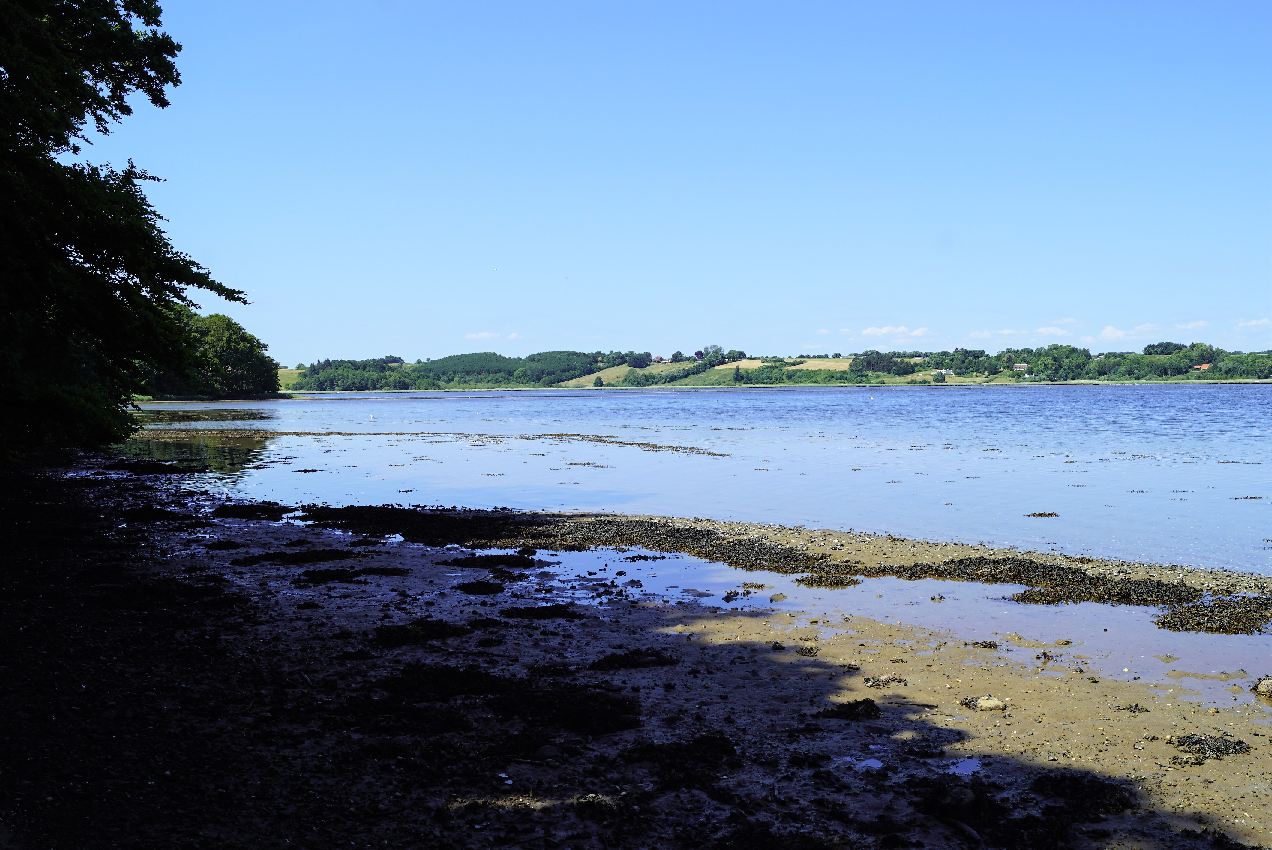 Gudsø Vig set mod nordvest fra Hovens Odde